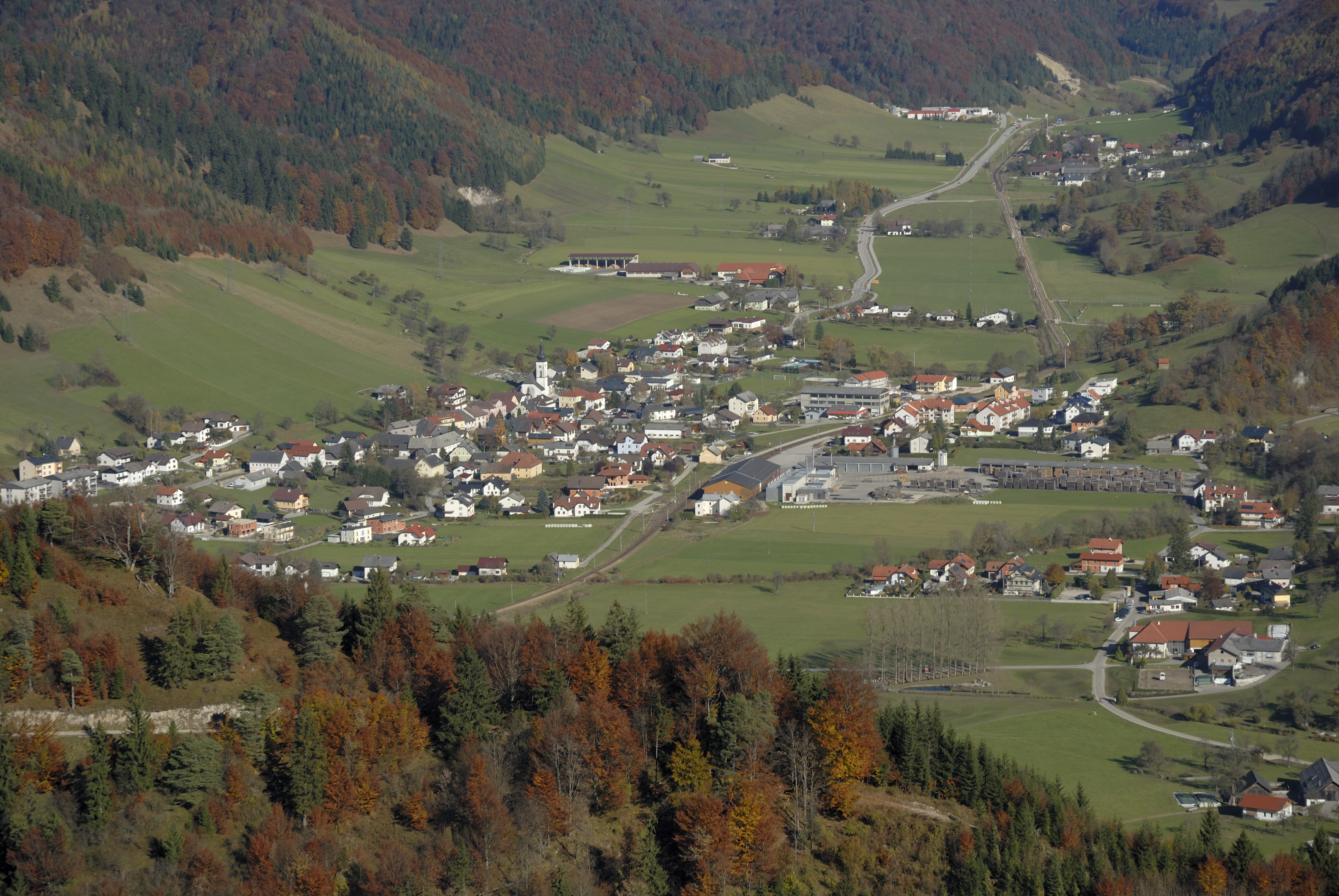 Gaflenz vom Heiligenstein